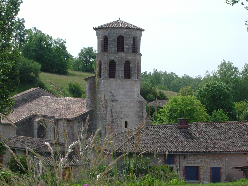 Église Saint-Eugène de Vieux (81).